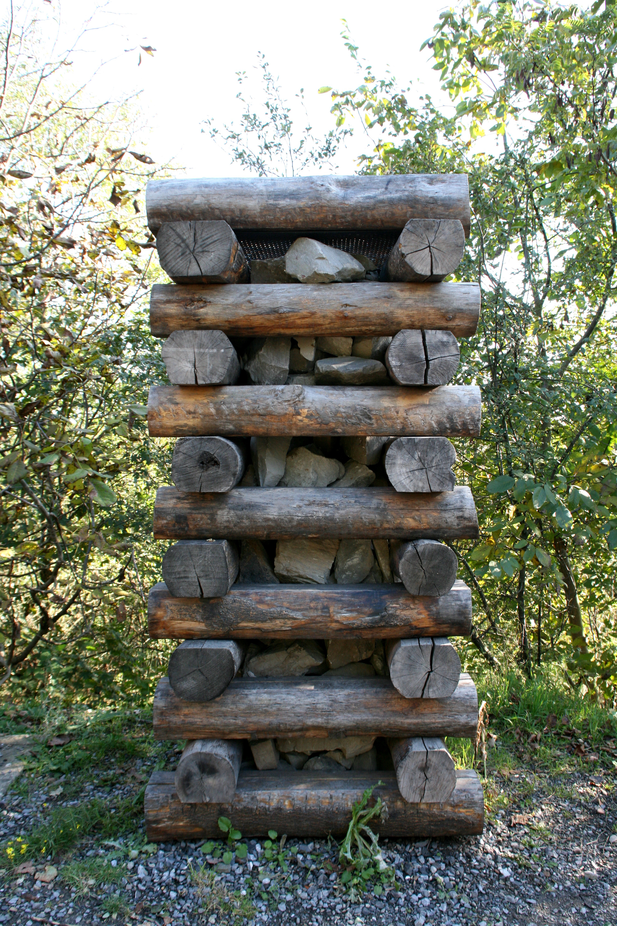 Kreuzweg, Station 2, auf Halde Haniel in Bottrop